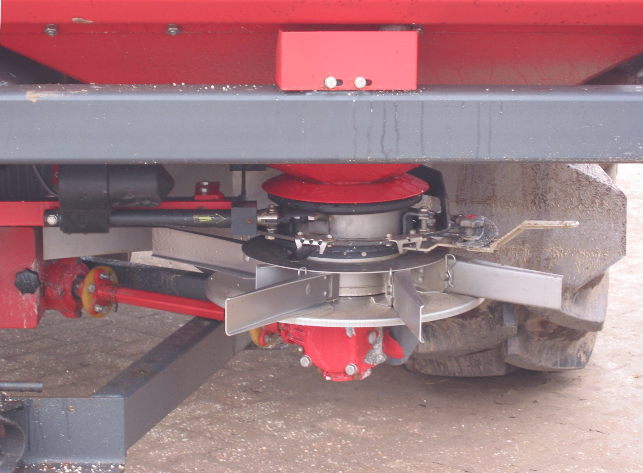 Kunstmestpendelstrooier Vicon RotaFlow RS-EDW, closeup van pendel